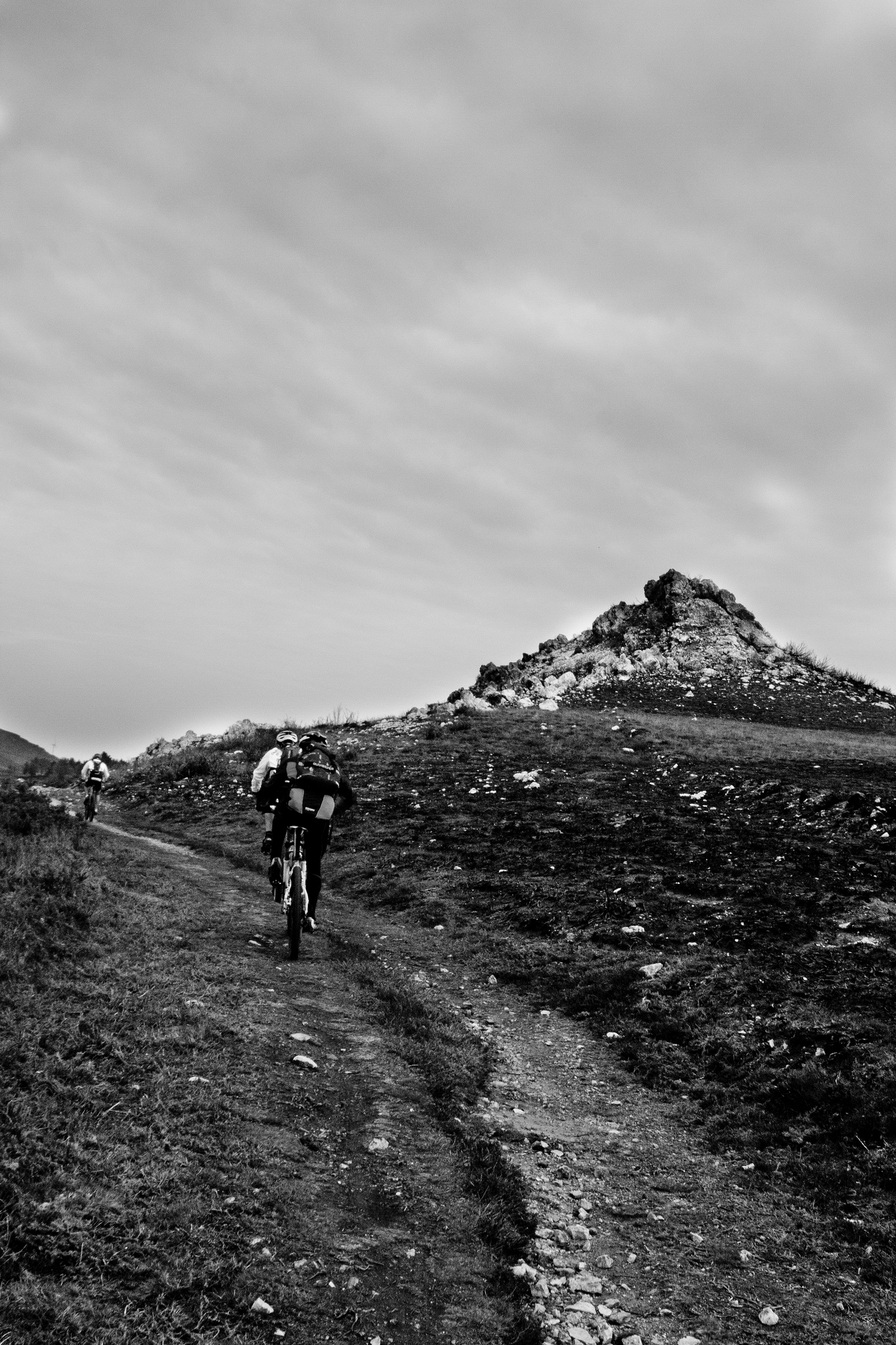 A Serra do Careón, entre Palas de Rei e Toques.